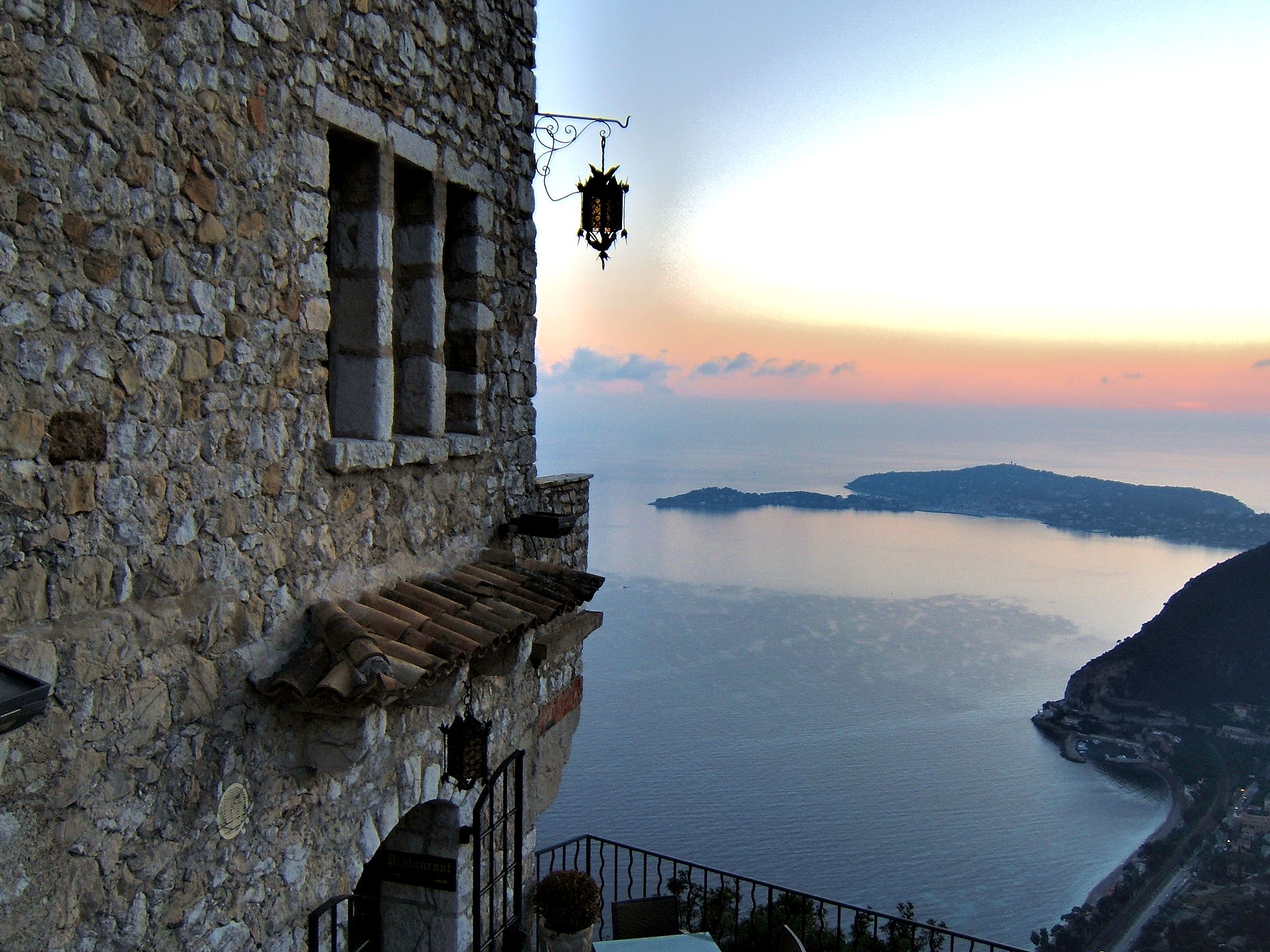 vue d'Eze